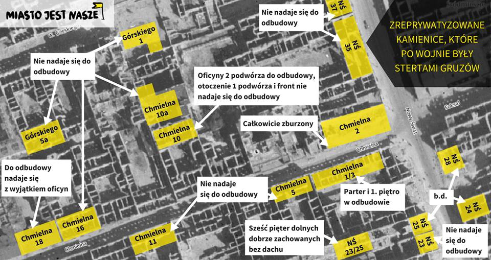 Mapa stanu warszawskich kamienic tuż po 1945, które zostały zreprywatyzowane w l. 1990-2016